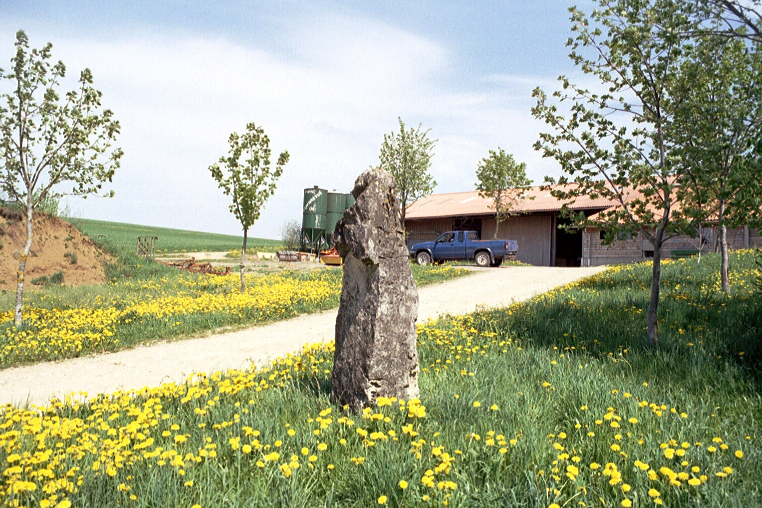 Landkreis Waldshut – Menhir auf einer Anhöhe bei Stühlingen- Mauchen.